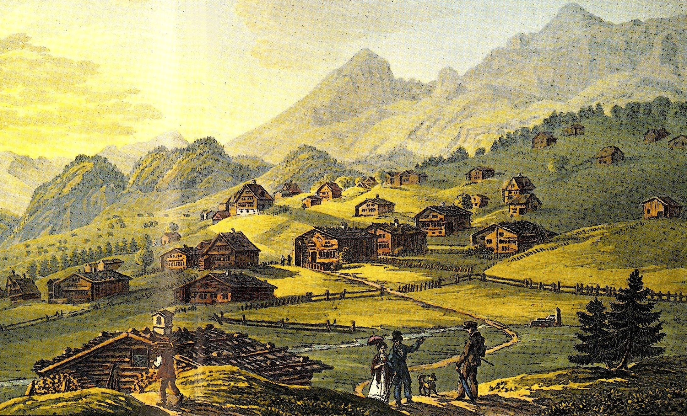 Zwinglis Geburtshaus: Lisighaus 1825, Aquatinta von Johann Baptist Isenring